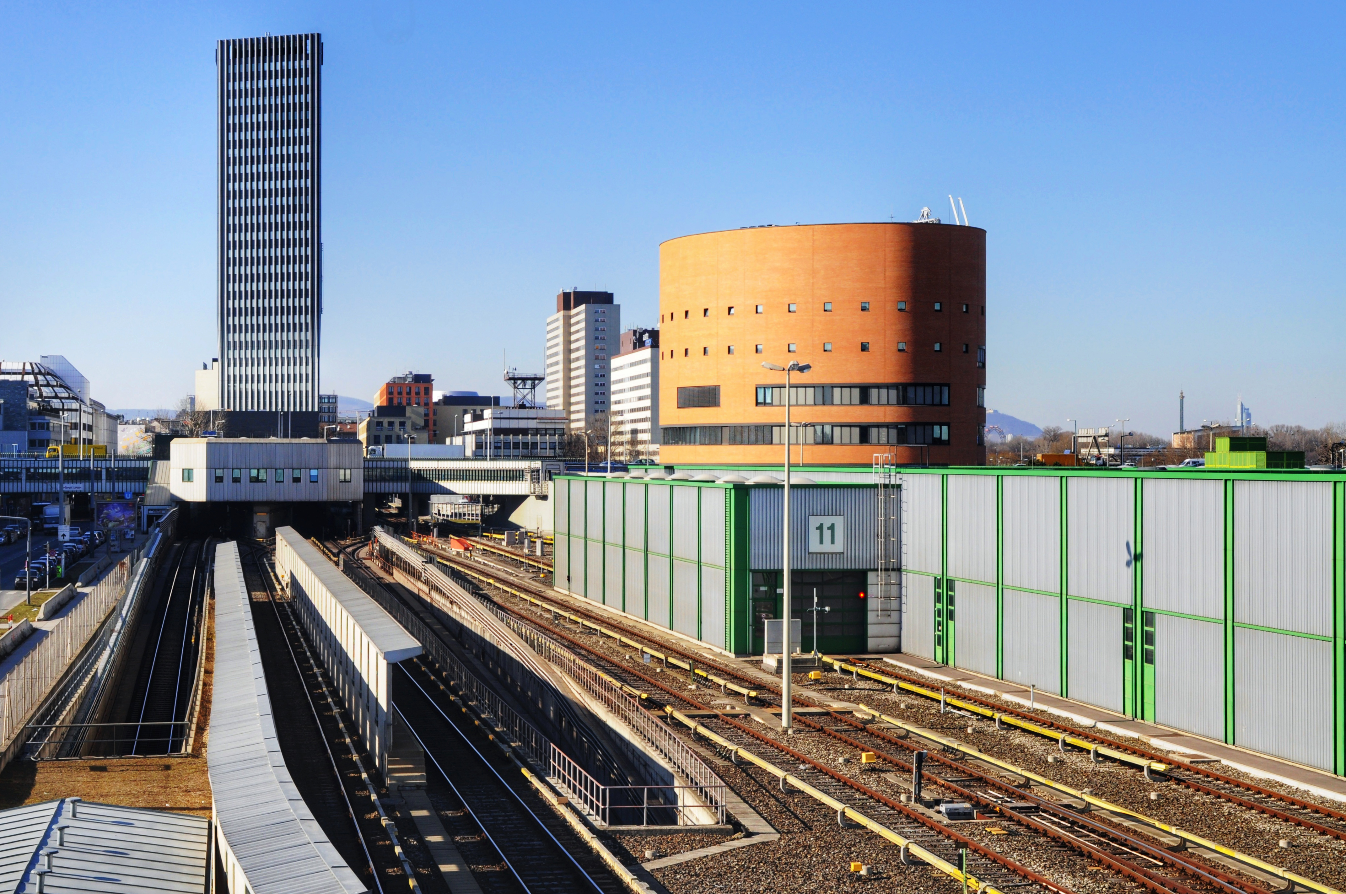 Wendeanlage, Waschstraße und Leitstelle beim Betriebsbahnhof Erdberg